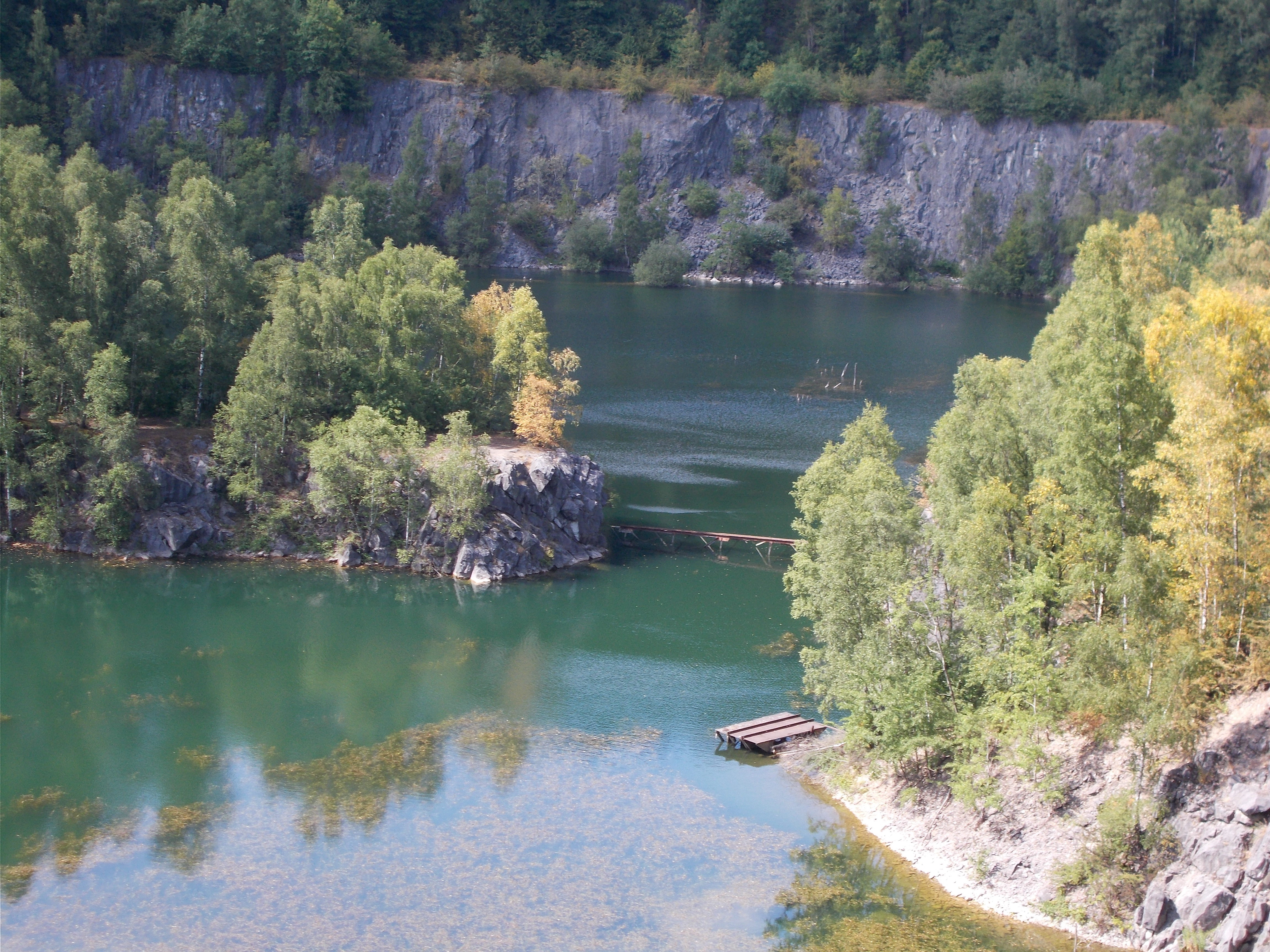 Blick auf den See im Naturschutzgebiet Steinbruch Schlupkothen.